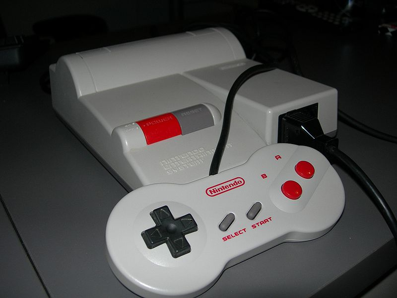 Nintendo Entertainment System 2